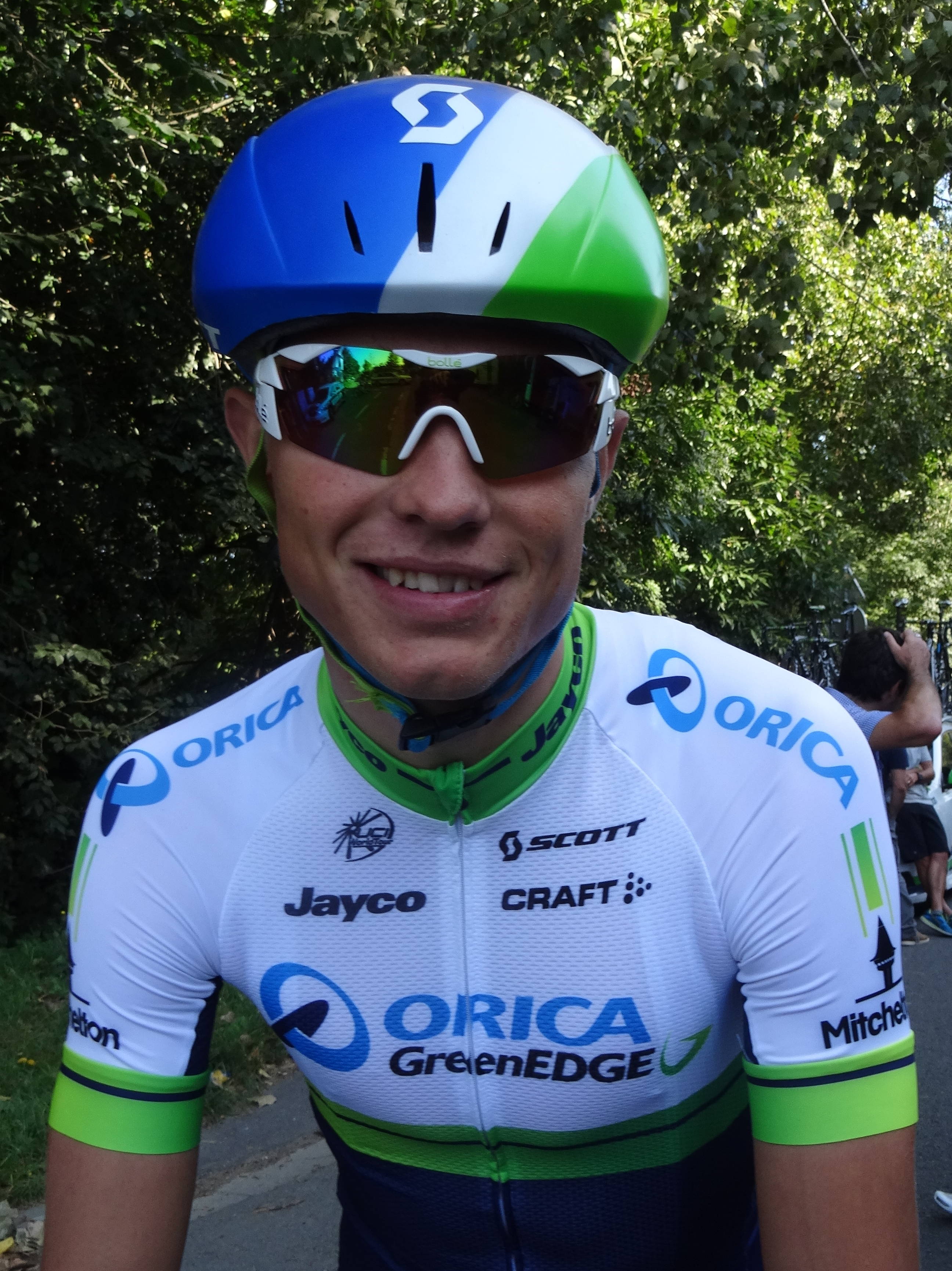 Reportage photographique réalisé le vendredi 3 octobre à l'occasion du départ de la deuxième étape de l'Eurométropole Tour 2014 à Estaimbourg (Estaimpuis), Belgique.